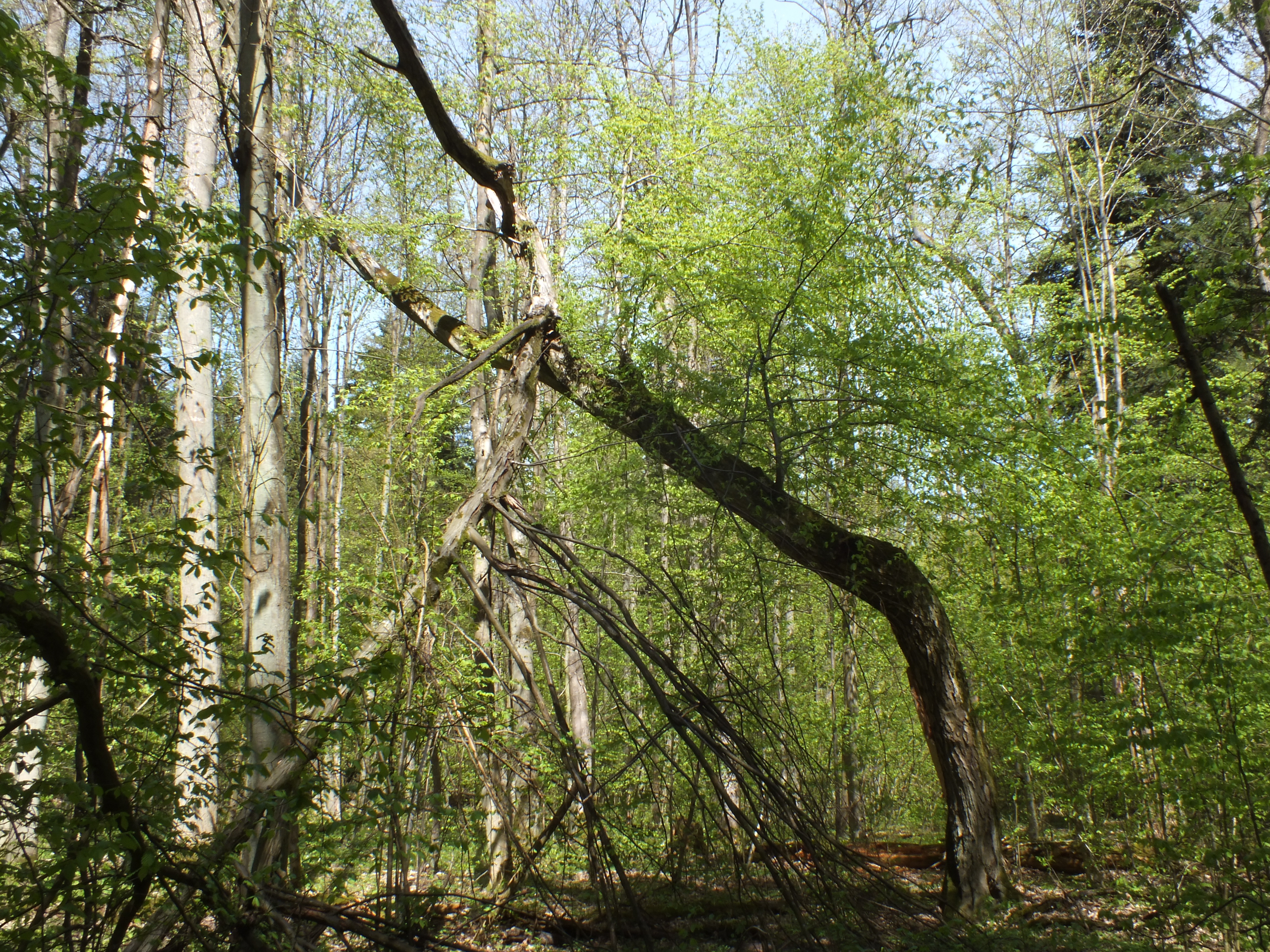 Specjalny obszar ochrony siedlisk Jata. This is a photography of Natura 2000 protected area with ID PLH060108